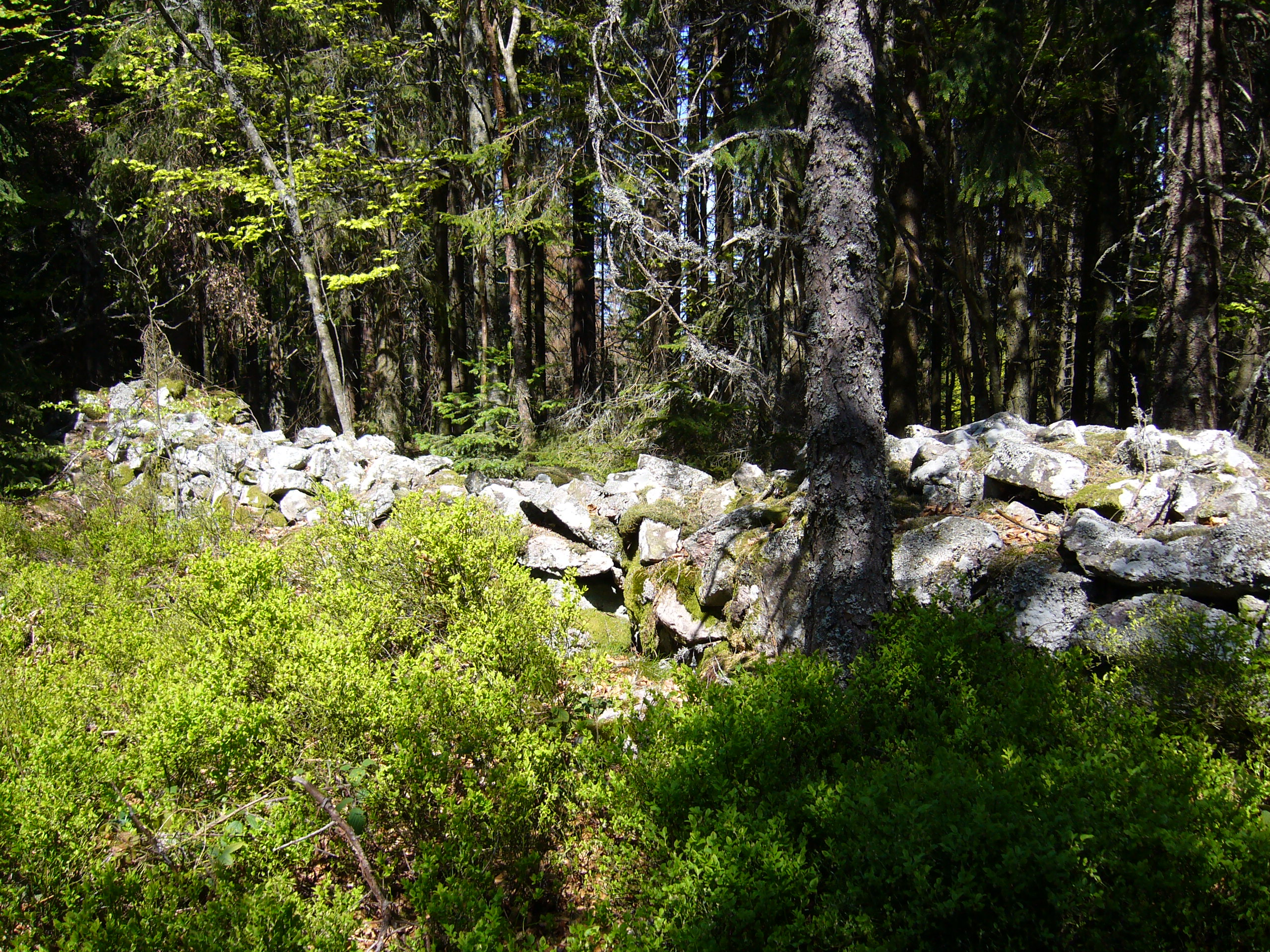 Taennchel.JPG